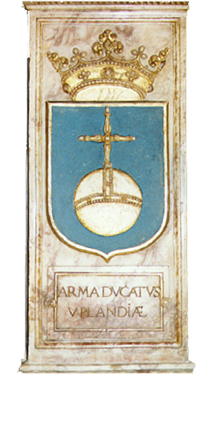 Upplands landskaps vapen vid Gustav vasas grav